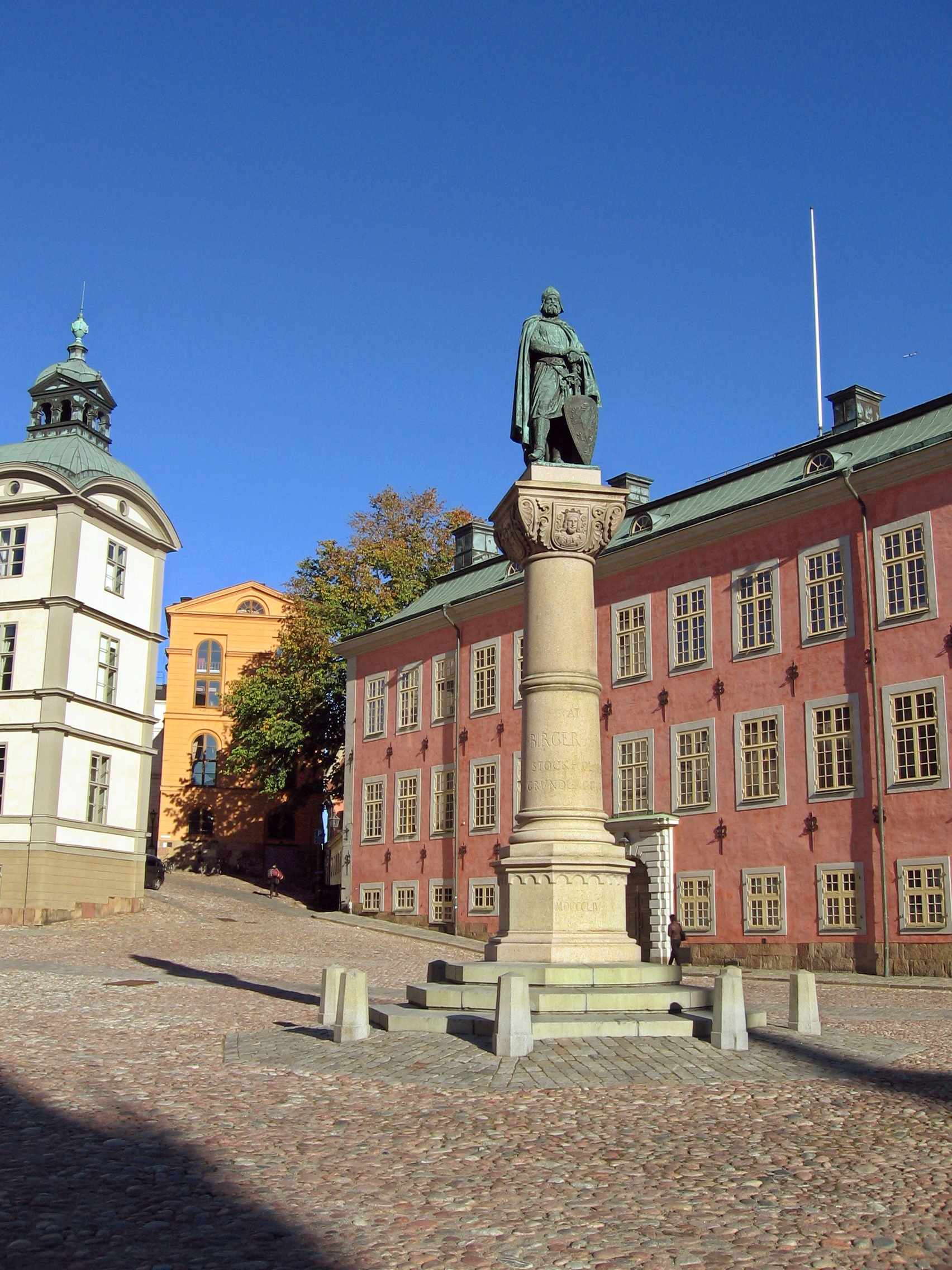 Памятник основателю Стокгольма Биргеру Ярлу.